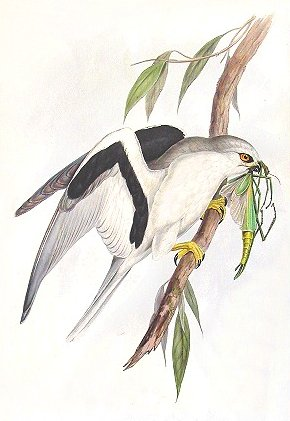 Elanus scriptus